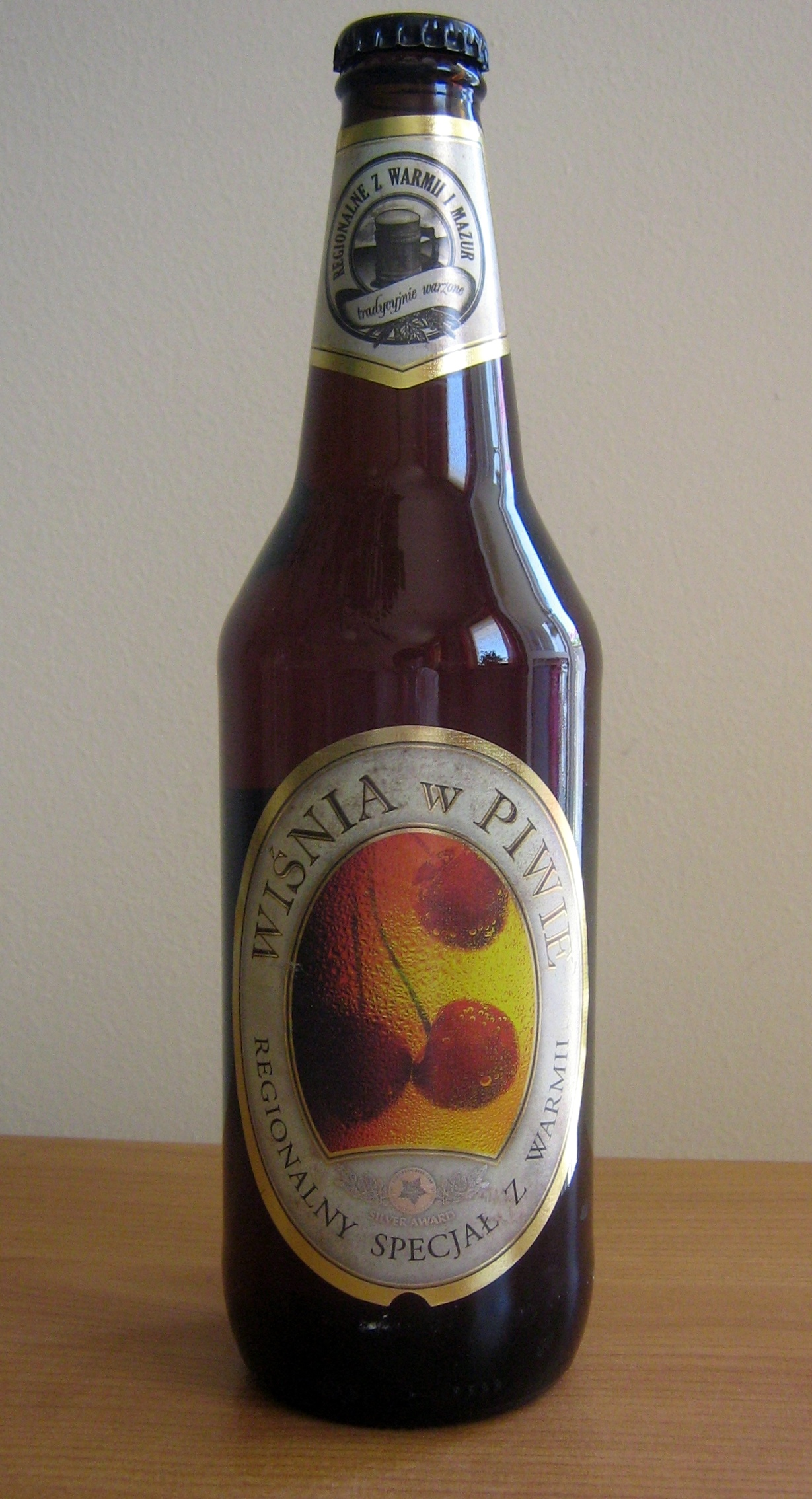 Piwo Browaru Kormoran